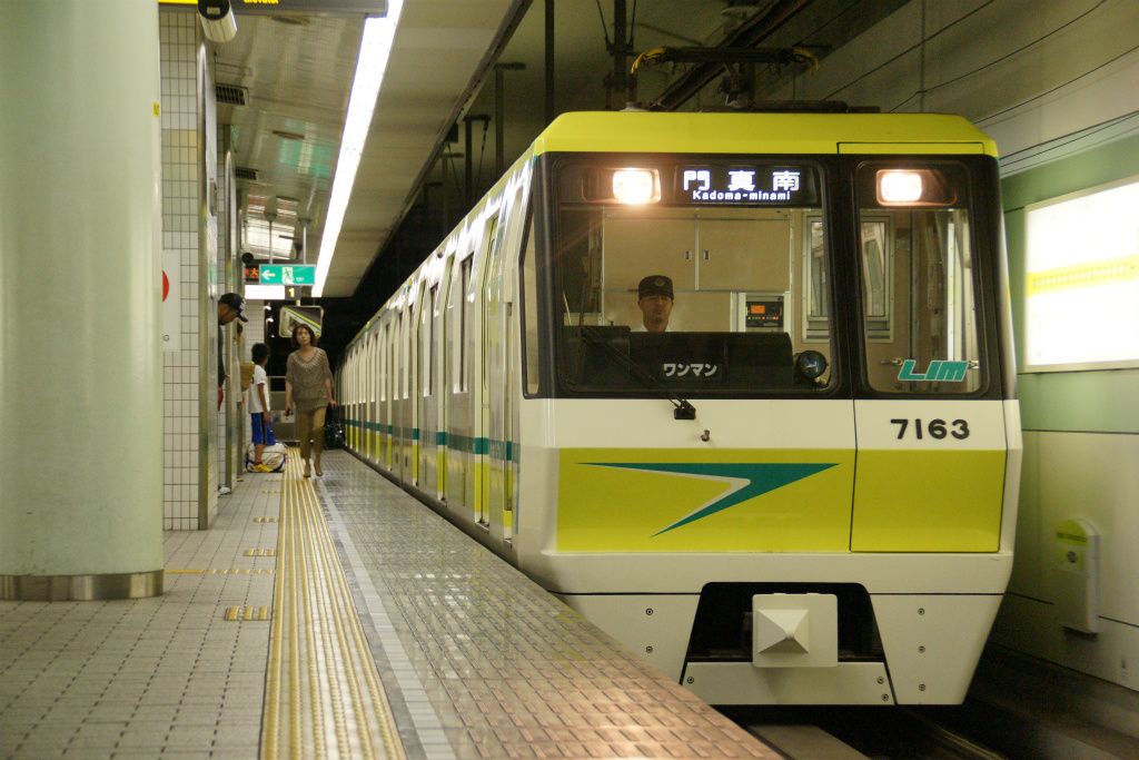 大阪市営地下鉄70系のIGBT更新車です 投稿者が撮影